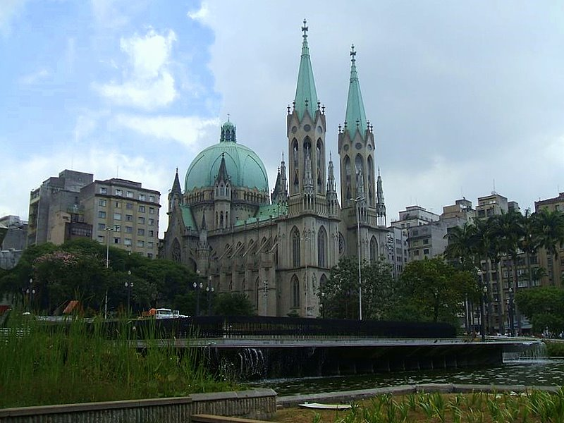 Catedral Metropolitana de São Paulo, vista da Praça da Sé.